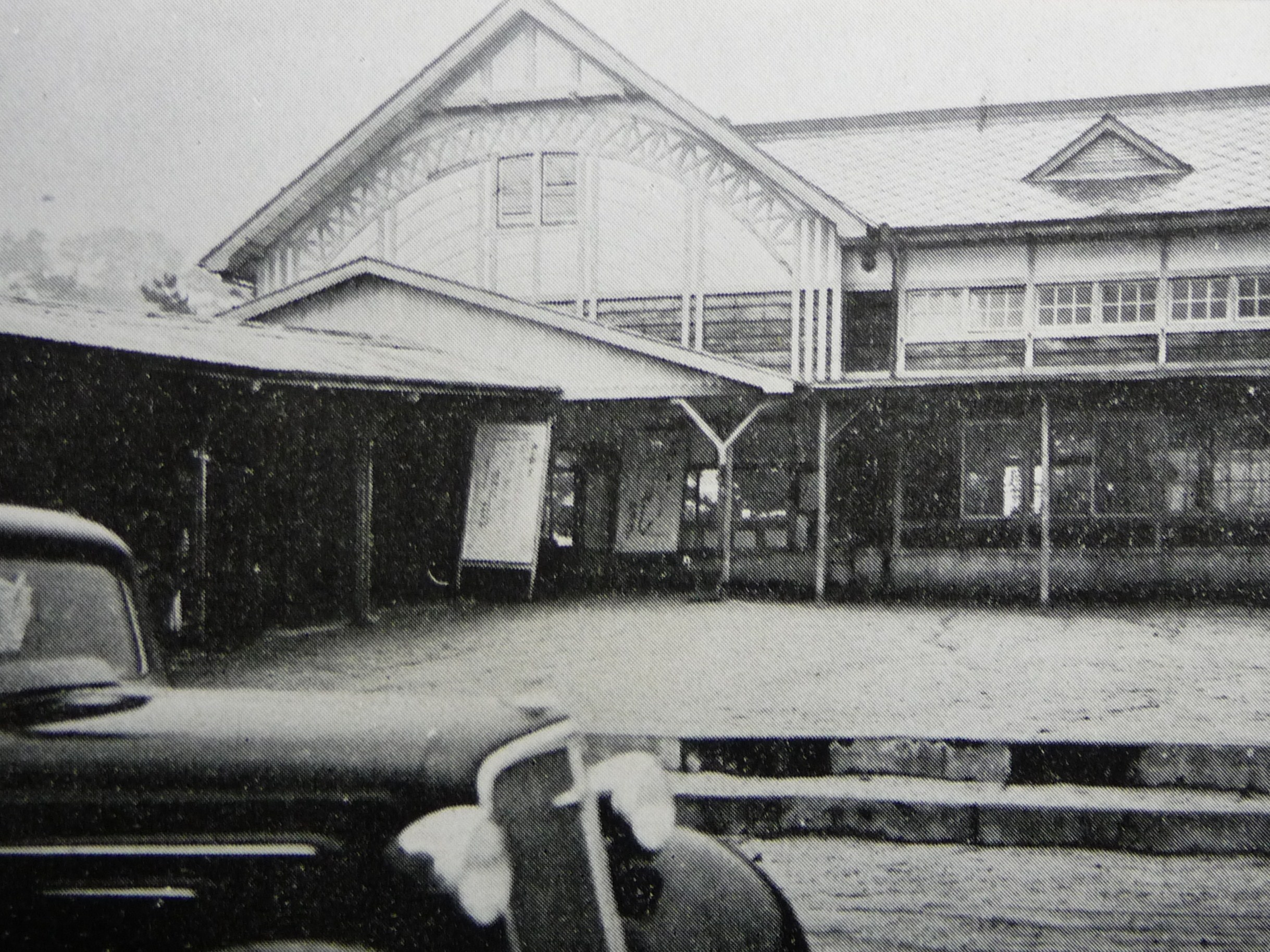 伊予鉄高浜駅